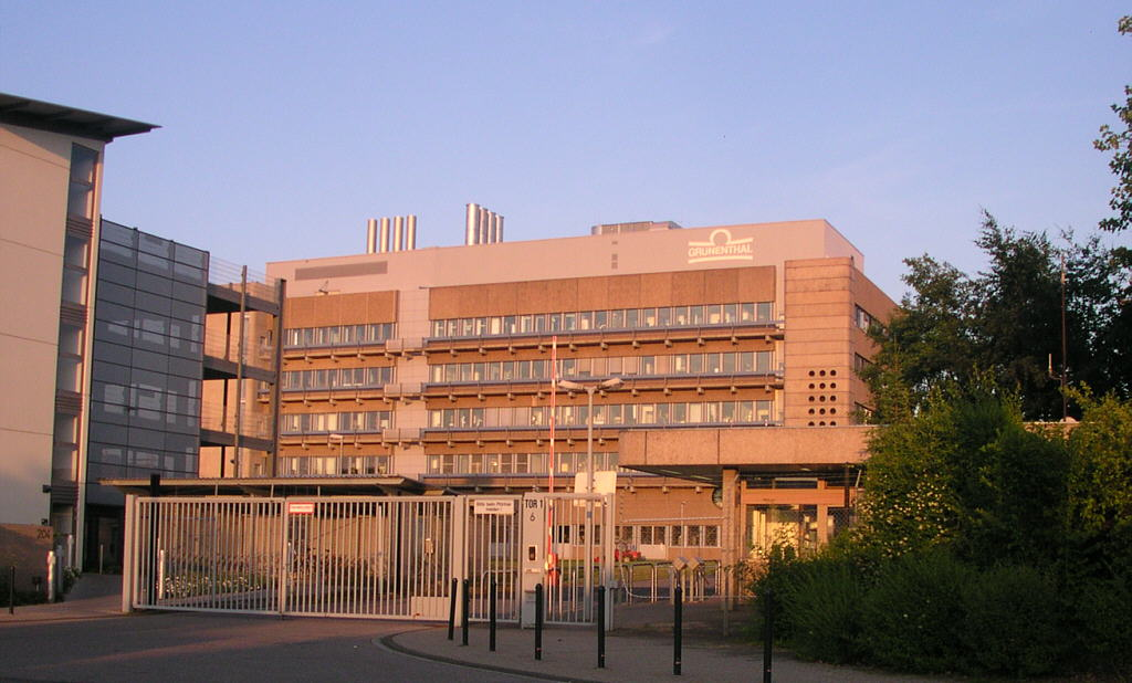 Aachen, Verwaltungsgebäude von Chemie Grünenthal